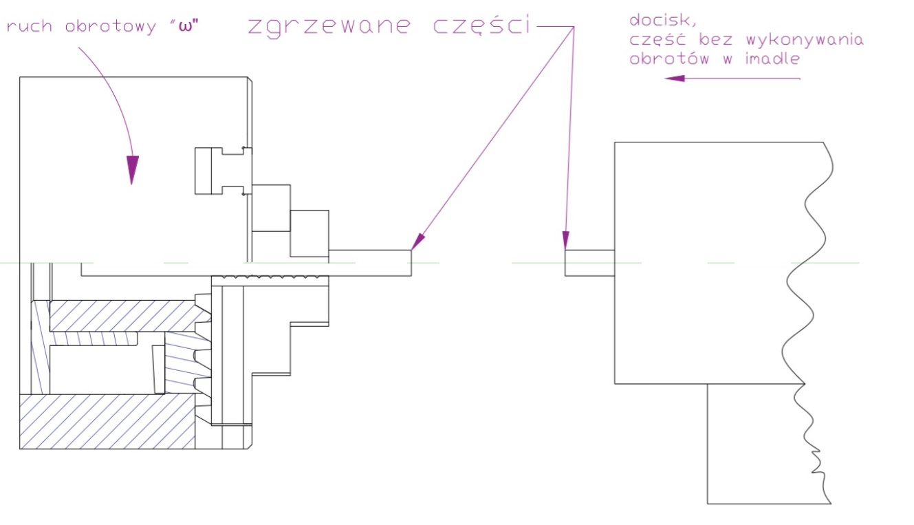 Przykład zgrzewania tarciowego obrotowego doczołowego - przedmiot w uchwycie i imadle.